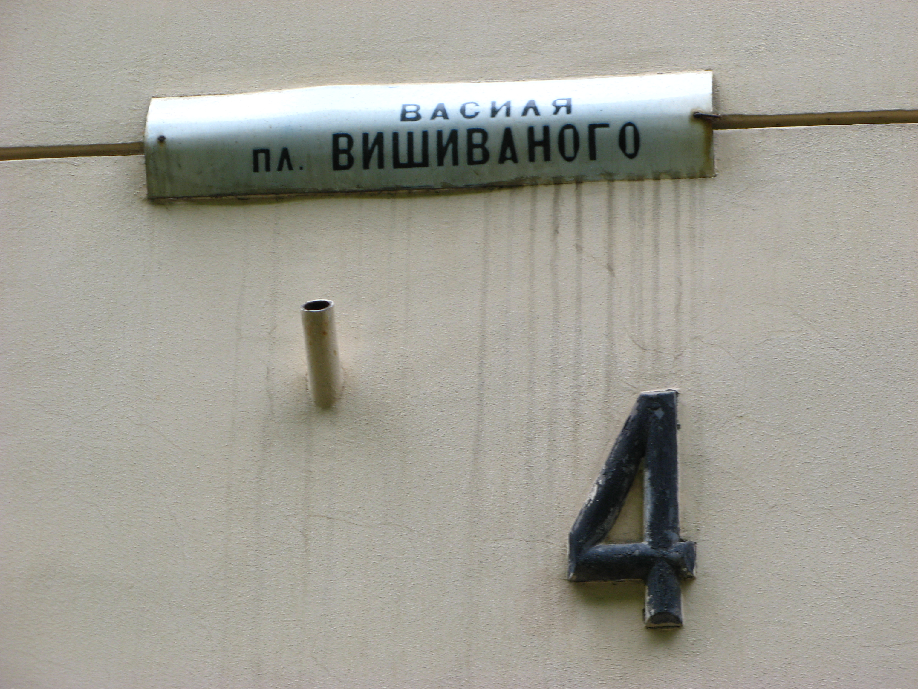 Львів, пл. Вишиваного